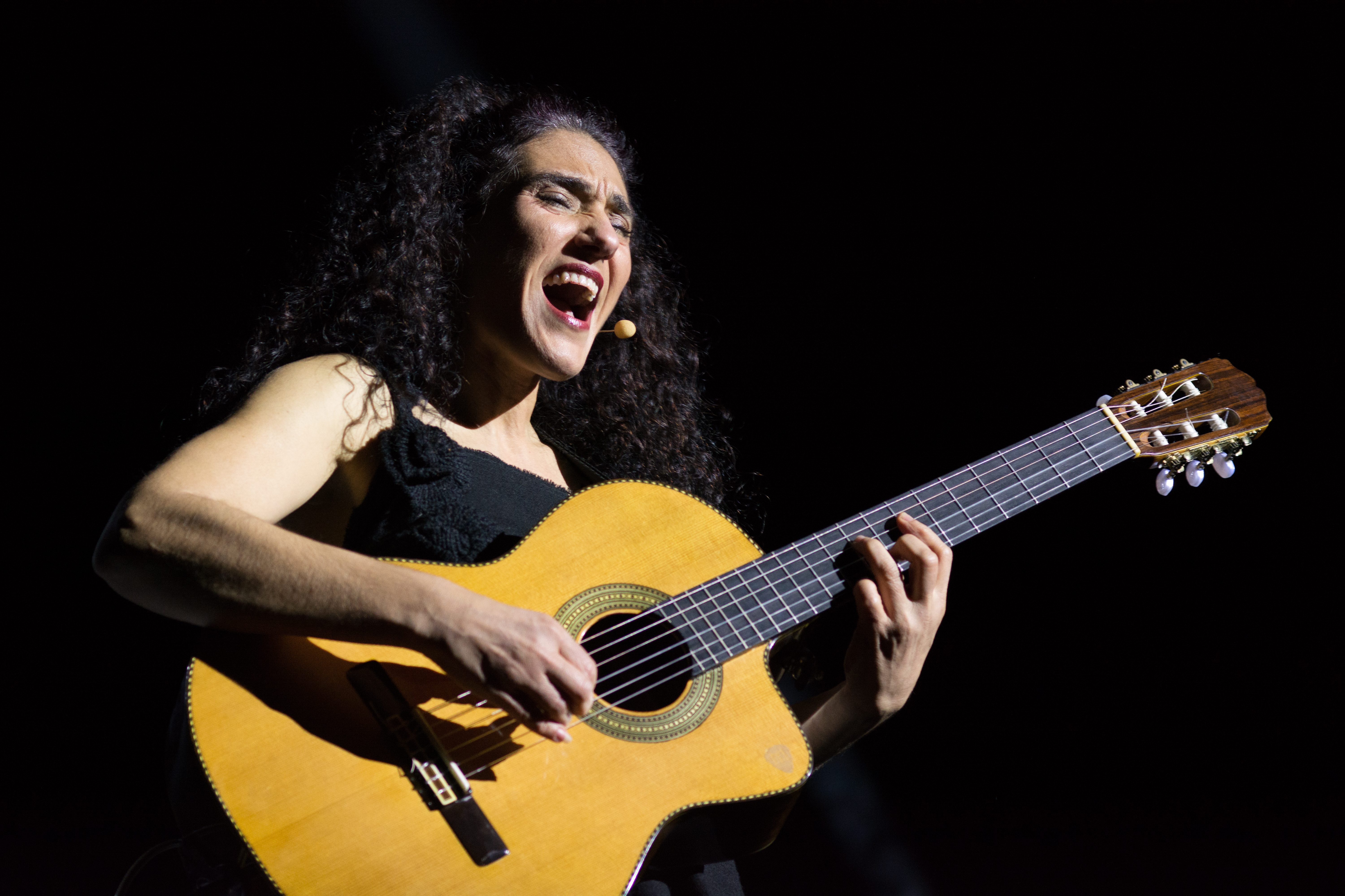 Badi Assad, Auditório Ibirapuera. Abertura da III Semana Assad - 2014